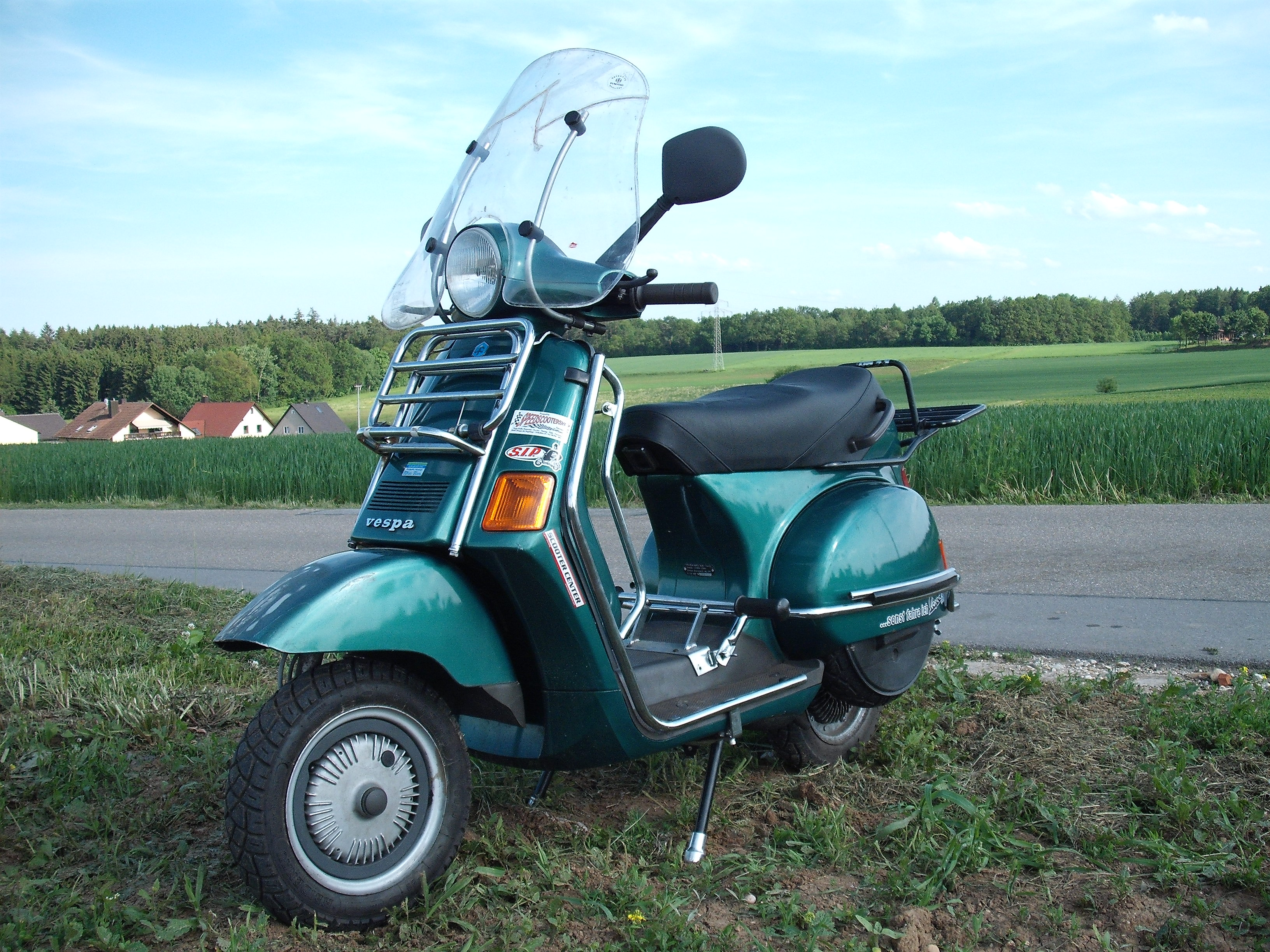 Piaggio Vespa Cosa GS 200cm³ Baujahr 1996